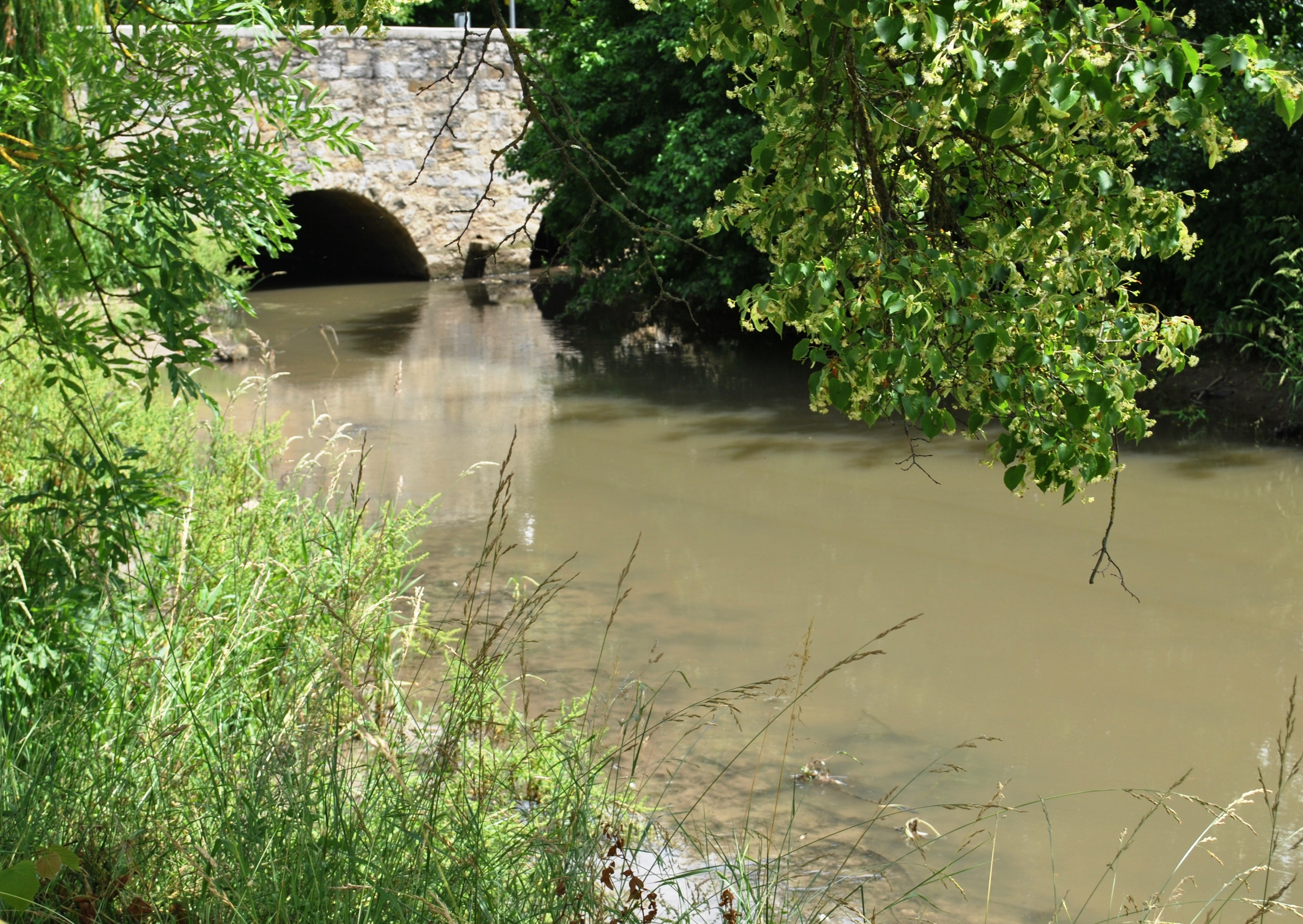 Volkachbach, Brücke, Obervolkach